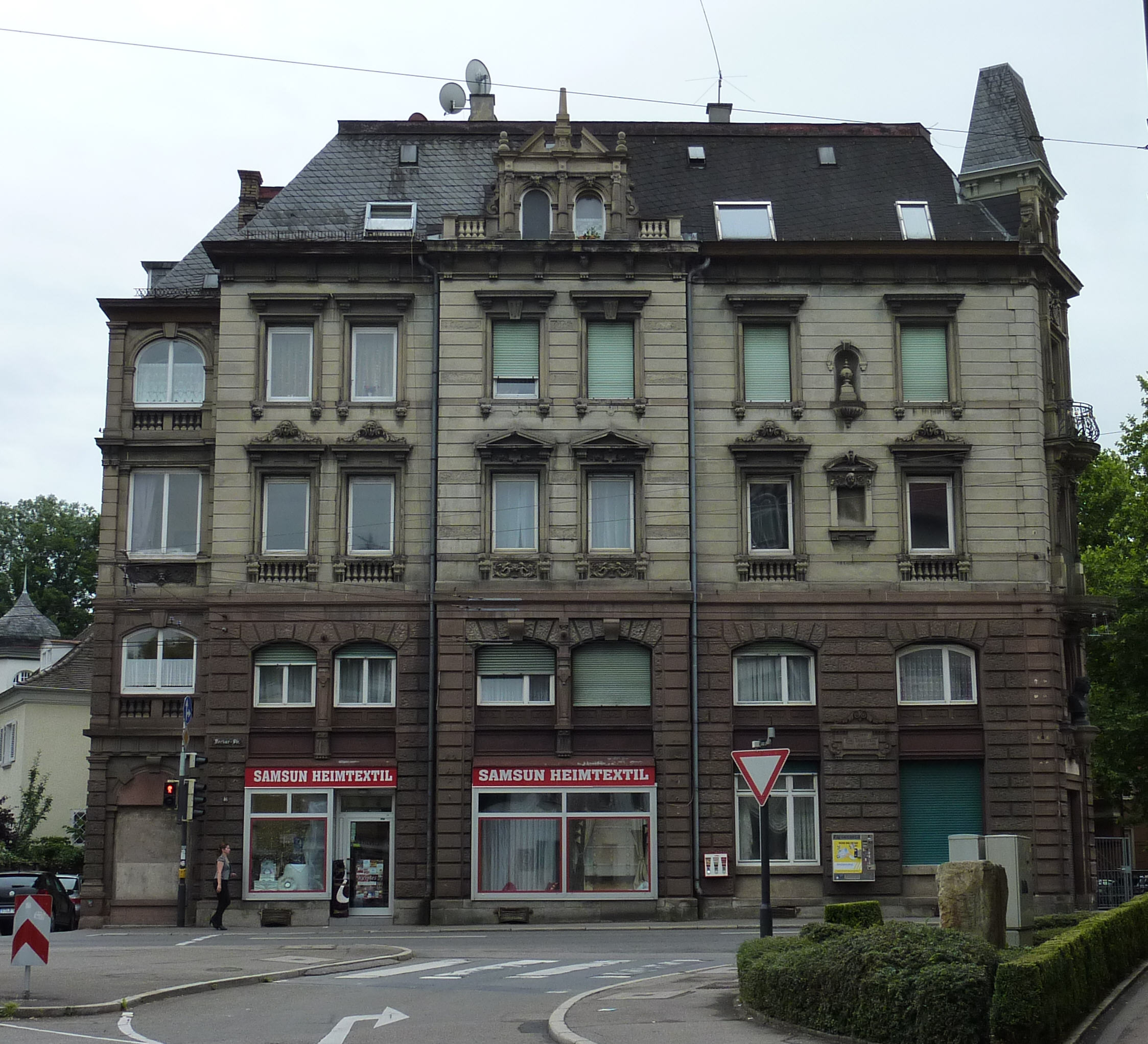 Bauwerk in der Neckarstraße 46 in Esslingen, erbaut 1898 von Christian Zillinger